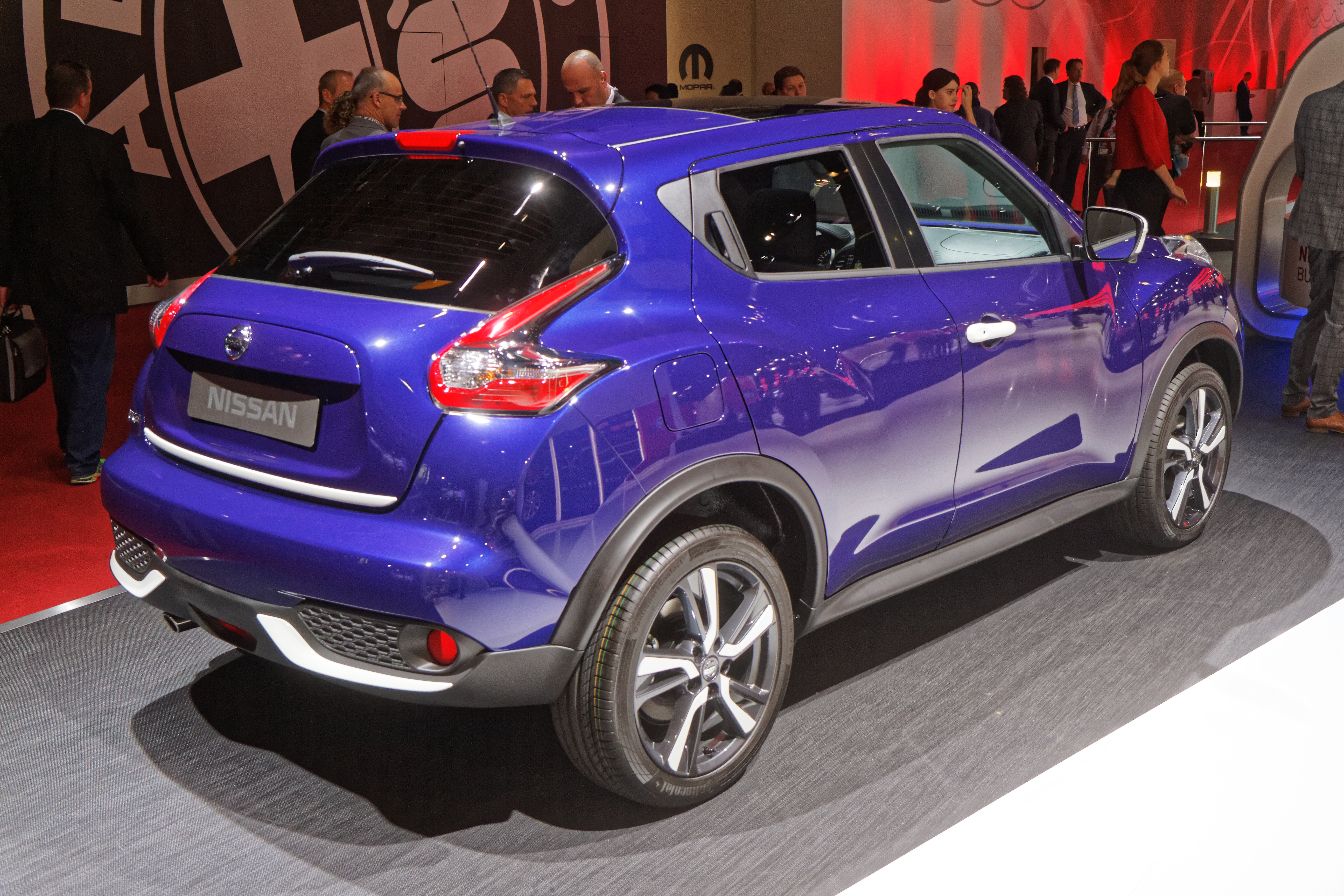 Une Nissan Juke présentée lors du mondial de l'automobile de Paris 2014.